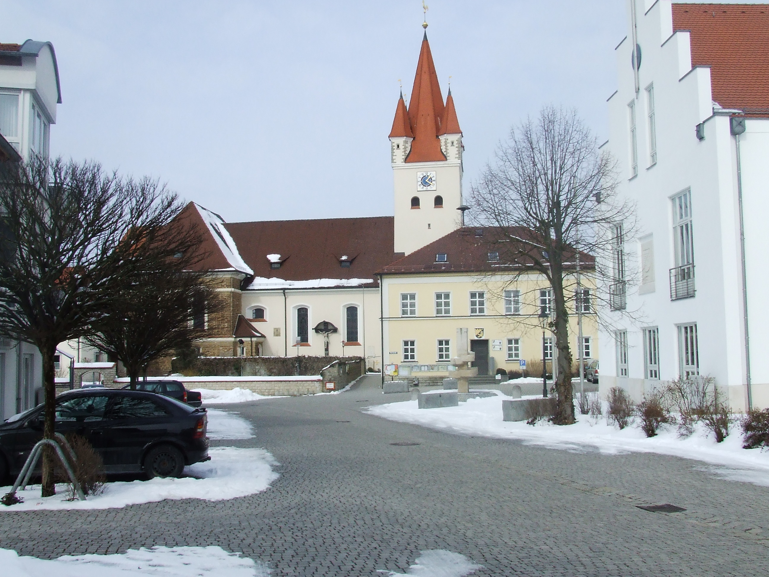 Landkreis Neumarkt, Gemeinde Berg, Kirche St. Vitus und Rathaus (altes Schulhaus) im Winter Quelle: Digitalaufnahme